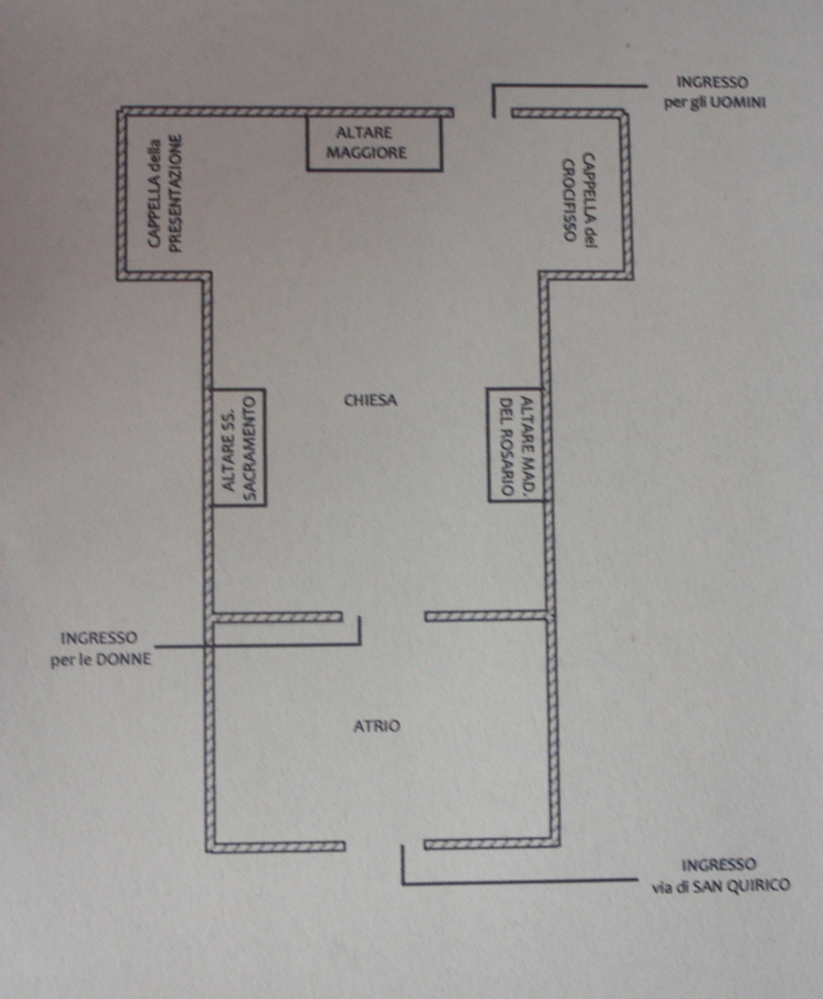 Pianta della chiesa antica di San Quirico a Legnaia, nella quale sono evidenziate le varie aree dell'edificio